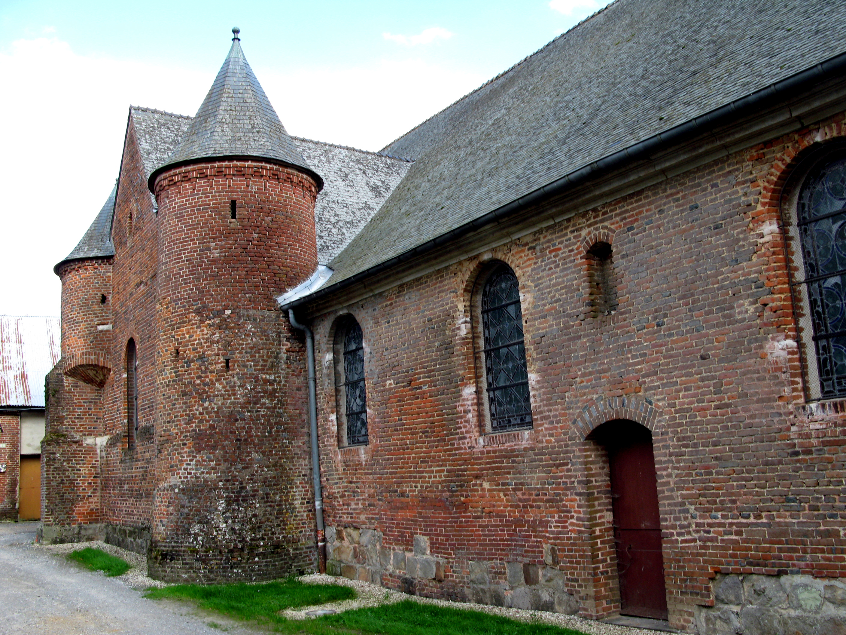 Plomion (Aisne, France) - La partie arrière de la façade nord de l'église fortifiée.